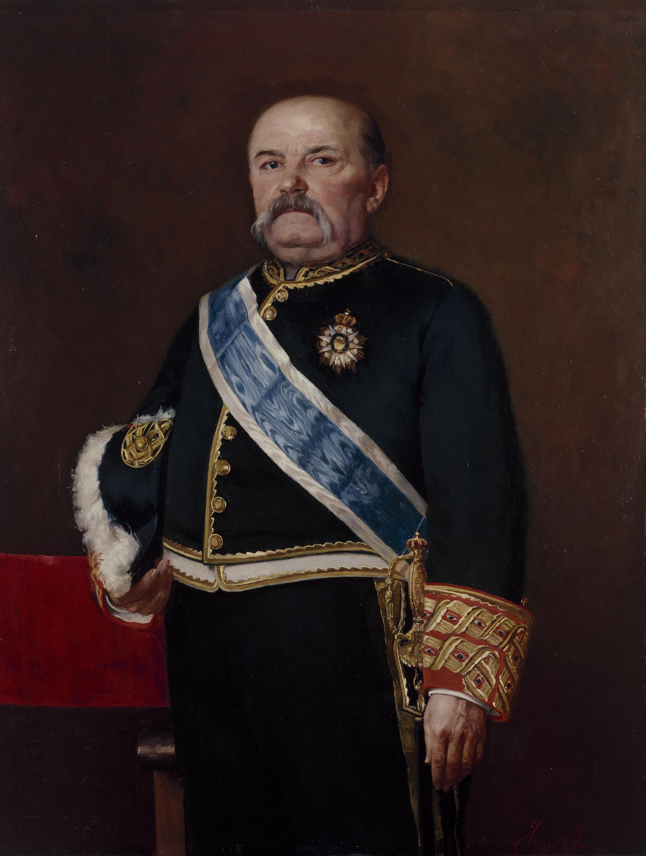 Retrato del politico, matemático y masón español Manuel Becerra y Bermúdez (1820-1896).